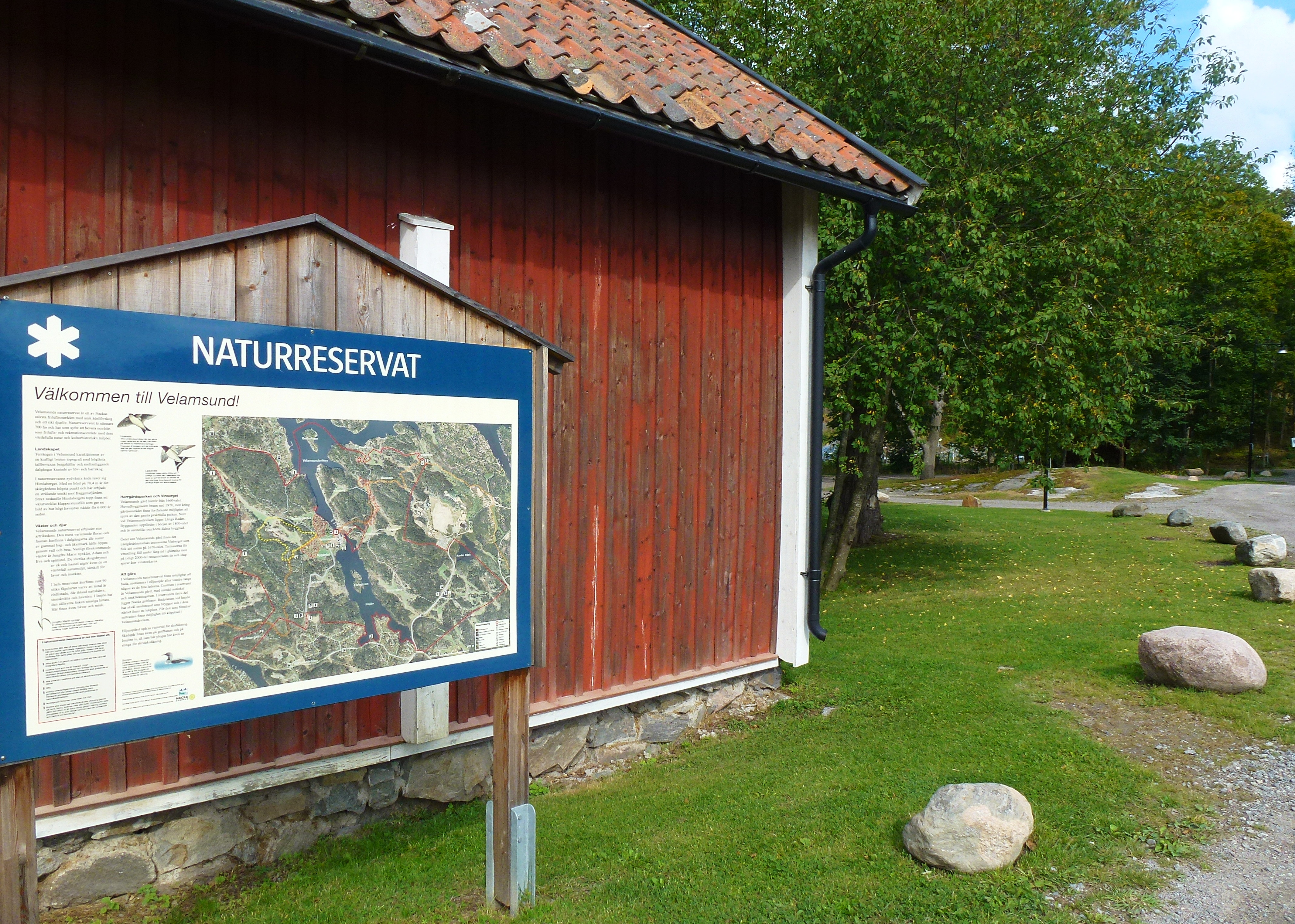 Velamsunds naturreservat, skylt